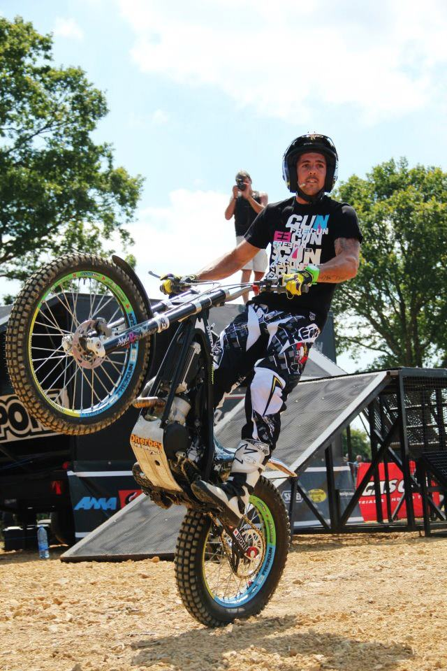 Christophe Bruand lors d'un show à Ouville en 2012.